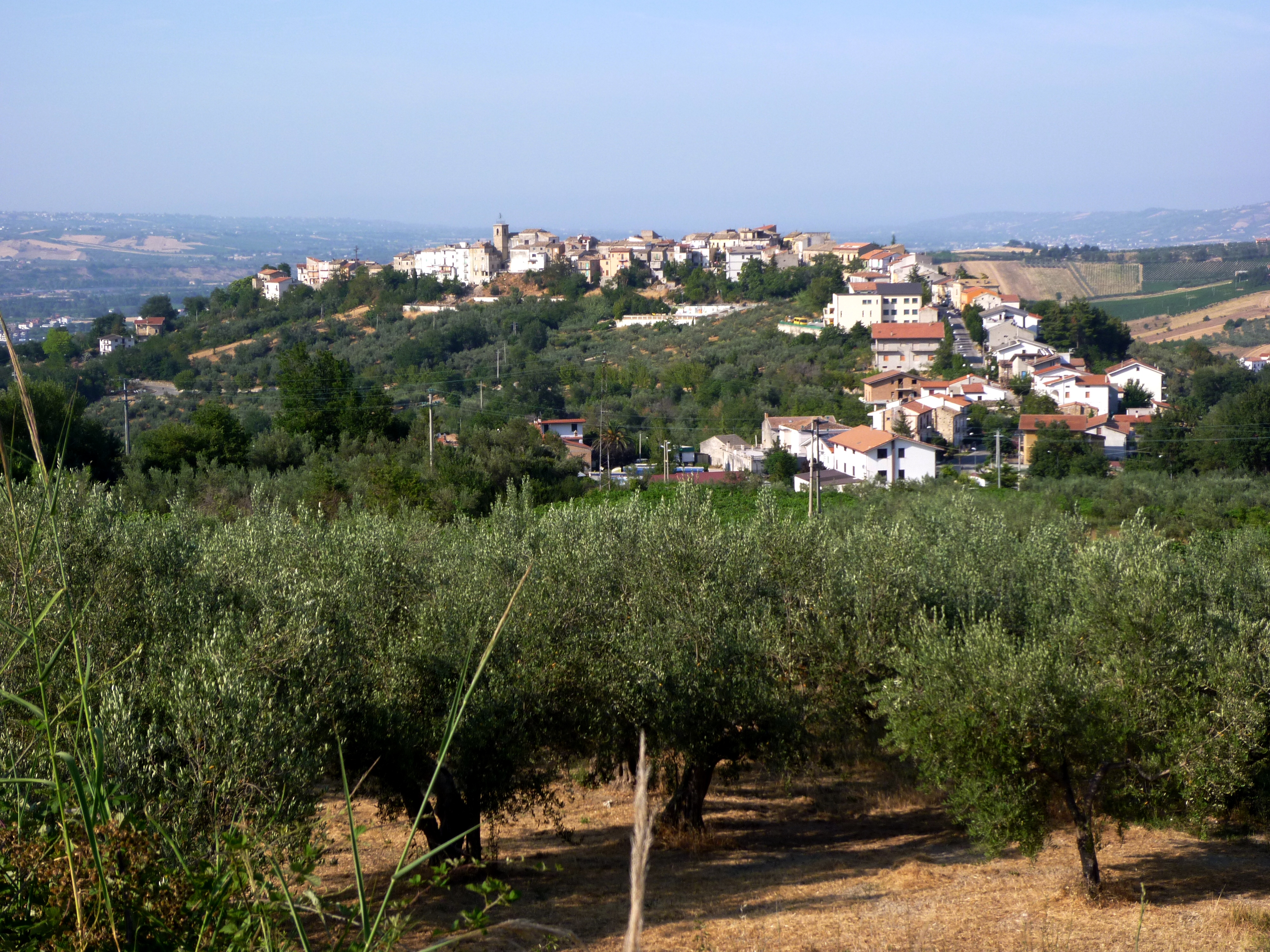 Veduta di Perano, Chieti.